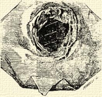 Czibak Imre pecsétje. Dőlt pajzsban a Gutkeled nemzetség címere: jobbra néző három sárkány fog, a pajzs felett csillag és félhold.